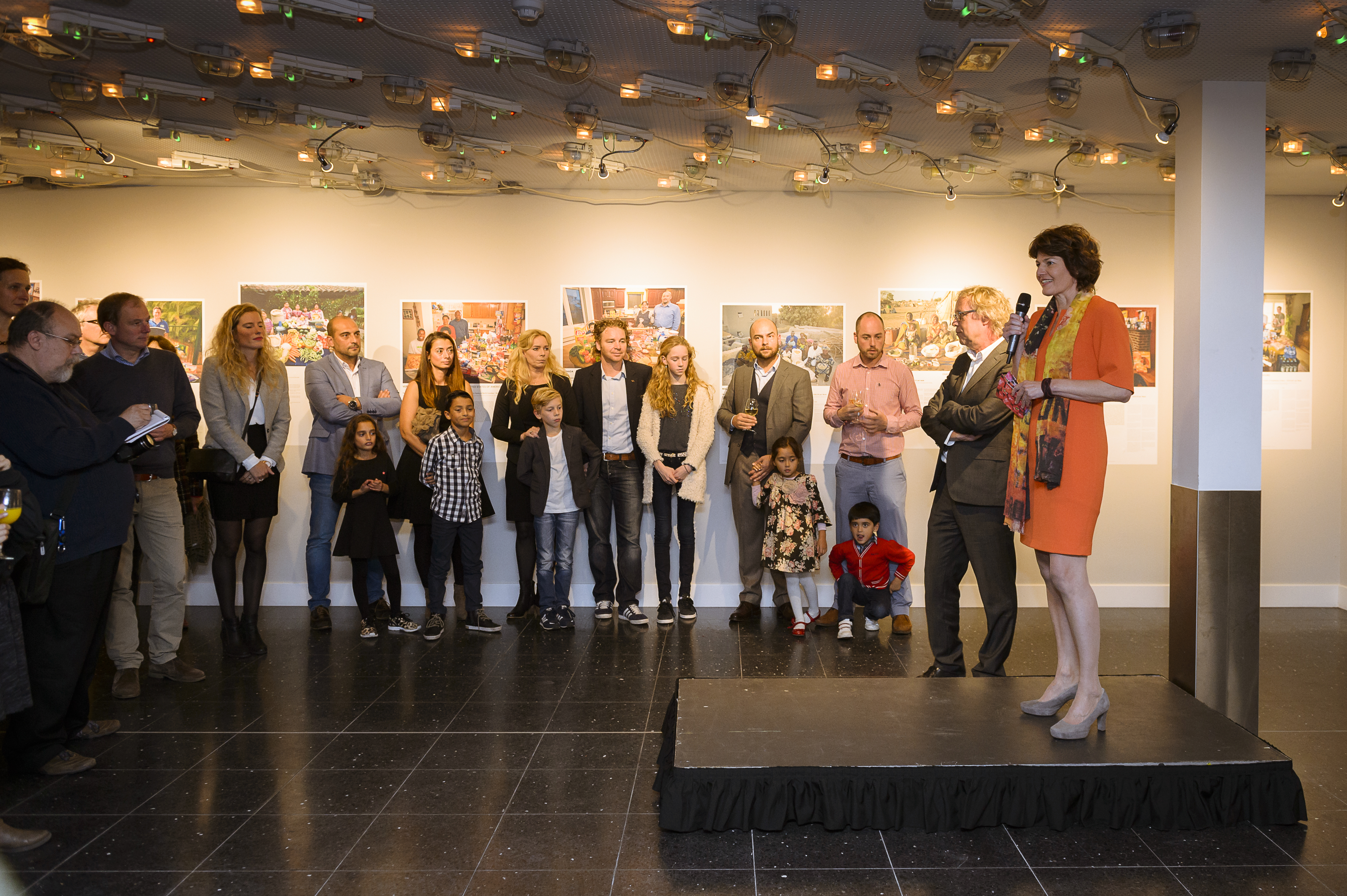 Directeur Gerda Feunekes van het Voedingscentrum opent de feestelijke onthulling en heet iedereen welkom.